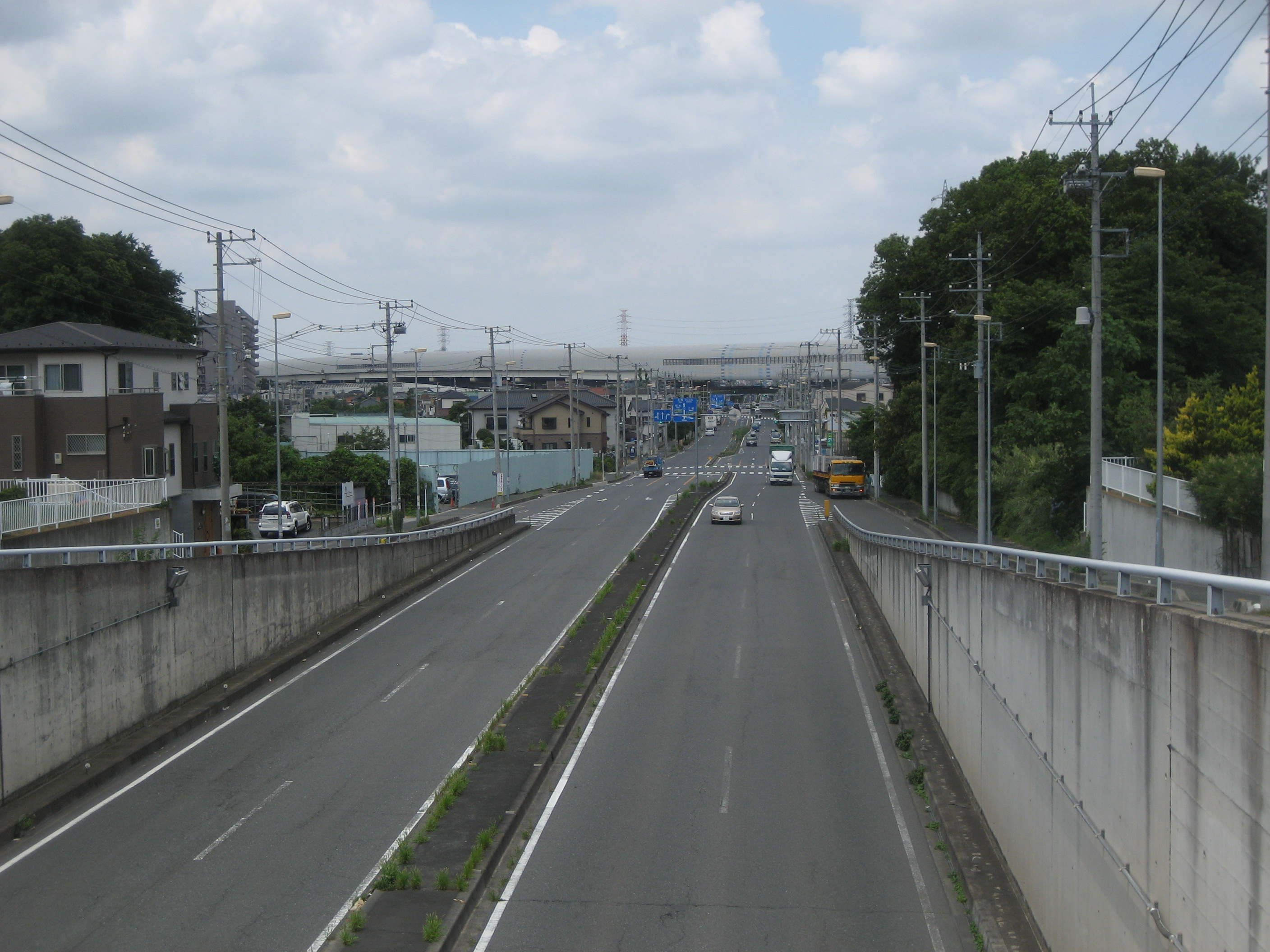 埼玉県道34号線川口市安行領根岸付近外環方面を撮影